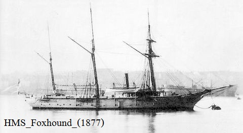 เรือรบ Foxhound